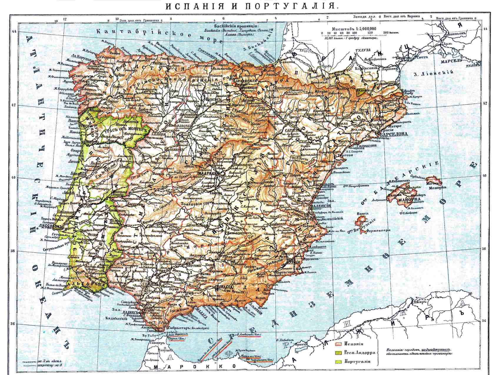 Карта Испании и Португалии из энциклопедии Брокгауза и Ефрона